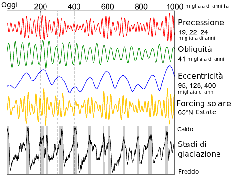 Questo grafico illustra le variazioni dei moti terrestri e le risultanti variazioni nel flusso di radiazione solare alle alte latitudini, oltre che i cicli di glaciazione osservati. In accordo con la teoria di Milanković, la precessione degli equinozi, la variazione nell'inclinazione assiale e le variazioni dell'eccentricità orbitale sono responsabili dei periodi di 100 000 anni dei cicli di glaciazione in un era glaciale, a causa delle variazioni della luce solare irradiante la terra in luoghi e tempi differenti, in particolare durante le le estati alle alte latitudini. Queste variazioni nell'orbita terrestre sono prevedibili conseguenze delle interazioni tra la Terra, la Luna e gli altri corpi celesti del sistema solare. I dati orbitali sono ricavati da Quinn et al. (1991). Sono indicate le principali frequenze per ognuno dei tre tipi variazione. Il grafico del forcing solare è derivato dall'insolazione al 1 luglio a 65° N, secondo il calcolatore di insolazione di Jonathan Levine's. I dati glaciali sono ricavati da Lisecky e Raymo (2005) e le barre grigie indicano i periodi interglaciali, qui definiti come deviazioni sulla media di 5000 anni di entità di almeno 0,8 deviazioni standard sopra la media. Copyright This image was produced by Robert A. Rohde from publicly available data, and is incorporated into the Global Warming Art project. Italian translation by Massimiliano Lincetto. References Lisiecki, L. E., and M. E. Raymo (2005), A Pliocene-Pleistocene stack of 57 globally distributed benthic d18O records, Paleoceanography 20, PA1003, Quinn, T.R. et al. "A Three Million Year Integration of the Earth's Orbit." The Astronomical Journal 101 pp. 2287-2305 (June 1991).